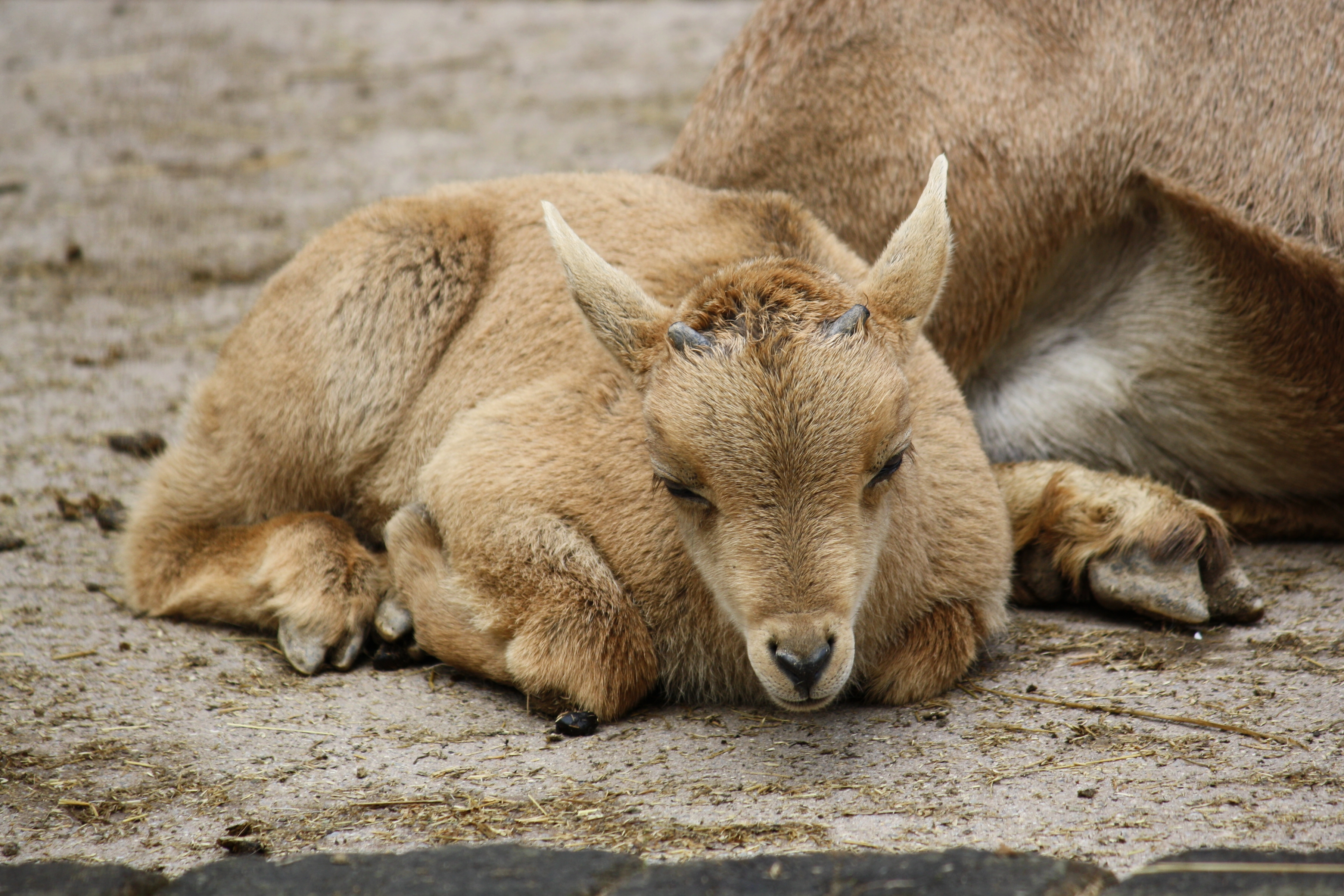 Paovce hřivnatá v pražské Zoo